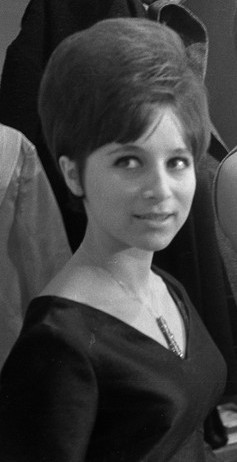 (z leve) Berta Ambrož, Elda Viler in Majda Sepe, Festival popevk Opatija 65.